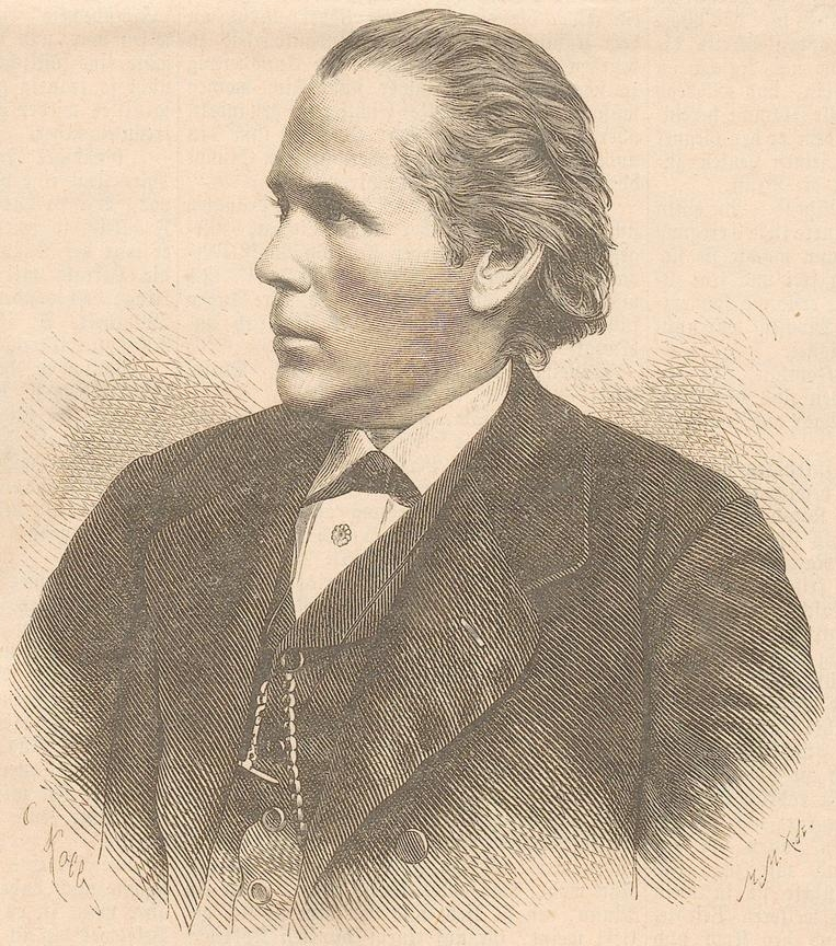 Prof. Dr. Max Joseph Oertel. In: Illustriertes Unterhaltungs-Blatt: wöchentliche Beilage zum Darmstädter Tagblatt. Darmstadt, 1890